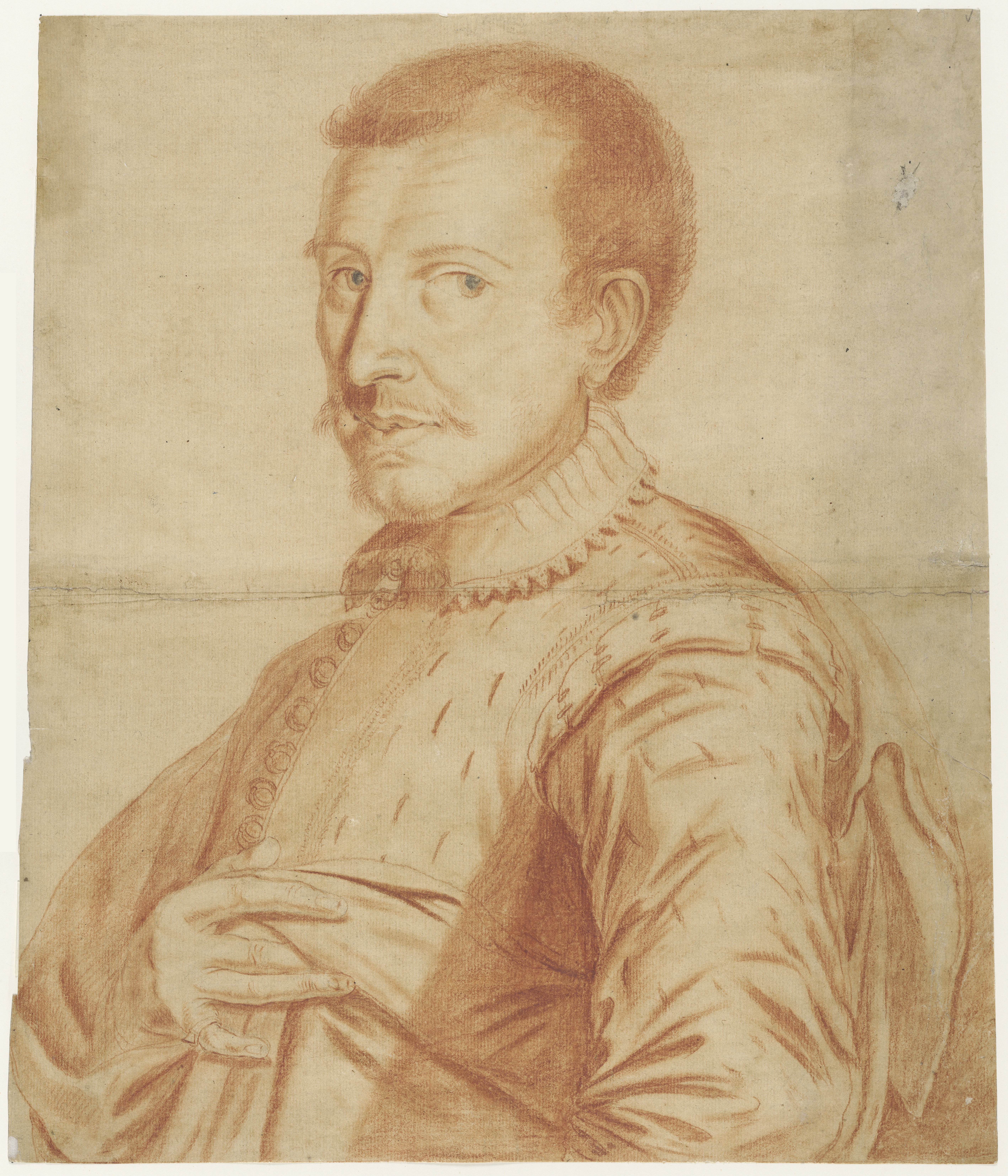 Tobias Stimmer